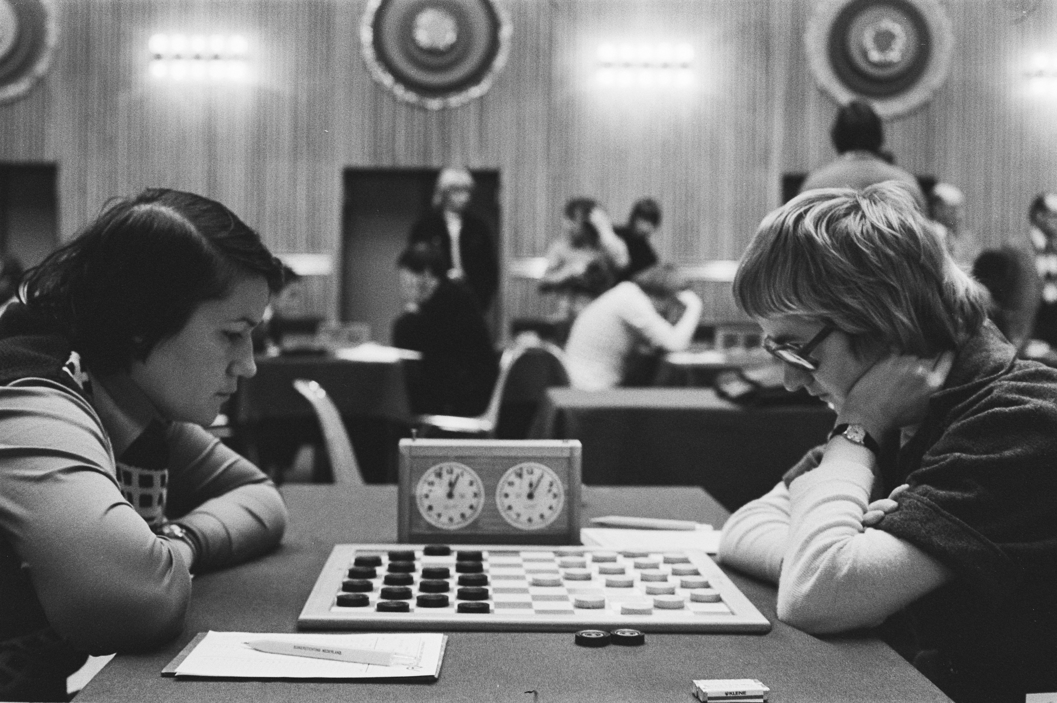 Collectie / Archief : Fotocollectie Anefo Reportage / Serie : [ onbekend ] Beschrijving : Suikerdamtoernooi; Dames. Wereldkampioene Elena Michailovskaja (links) tegen Barbara Graas Datum : 28 december 1976 Trefwoorden : dammen, damsport, sport Persoonsnaam : Graas, Barbara, Michailovskaja, Elena,, Elena Instellingsnaam : Suikerdamtoernooi Fotograaf : Verhoeff, Bert / Anefo Auteursrechthebbende : Nationaal Archief Materiaalsoort : Negatief (zwart/wit) Nummer archiefinventaris : bekijk toegang 2.24.01.05 Bestanddeelnummer : 928-9570